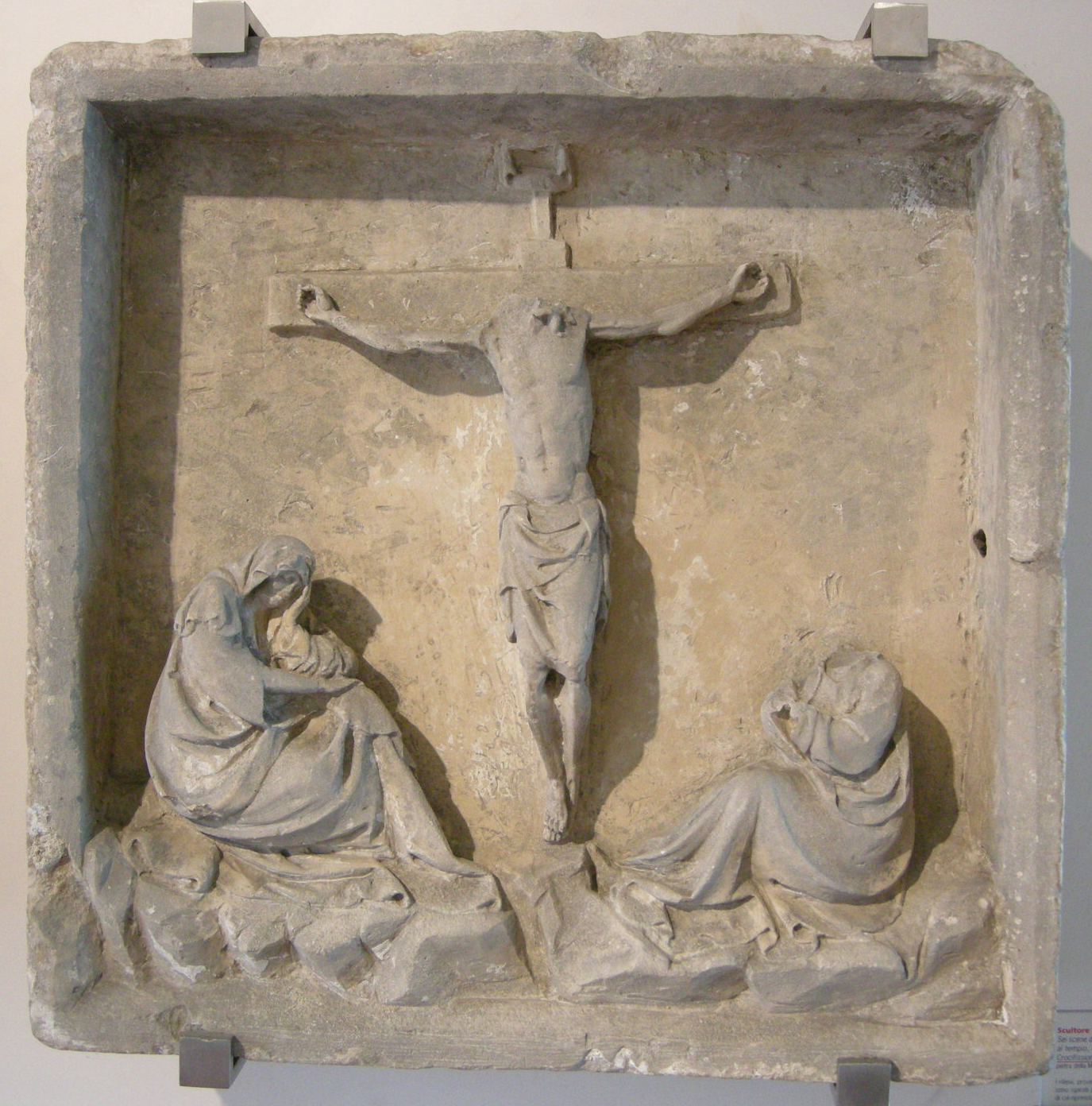 Scultore abruzzese della prima metà del XV sec., da casteldisangro, crocefissione